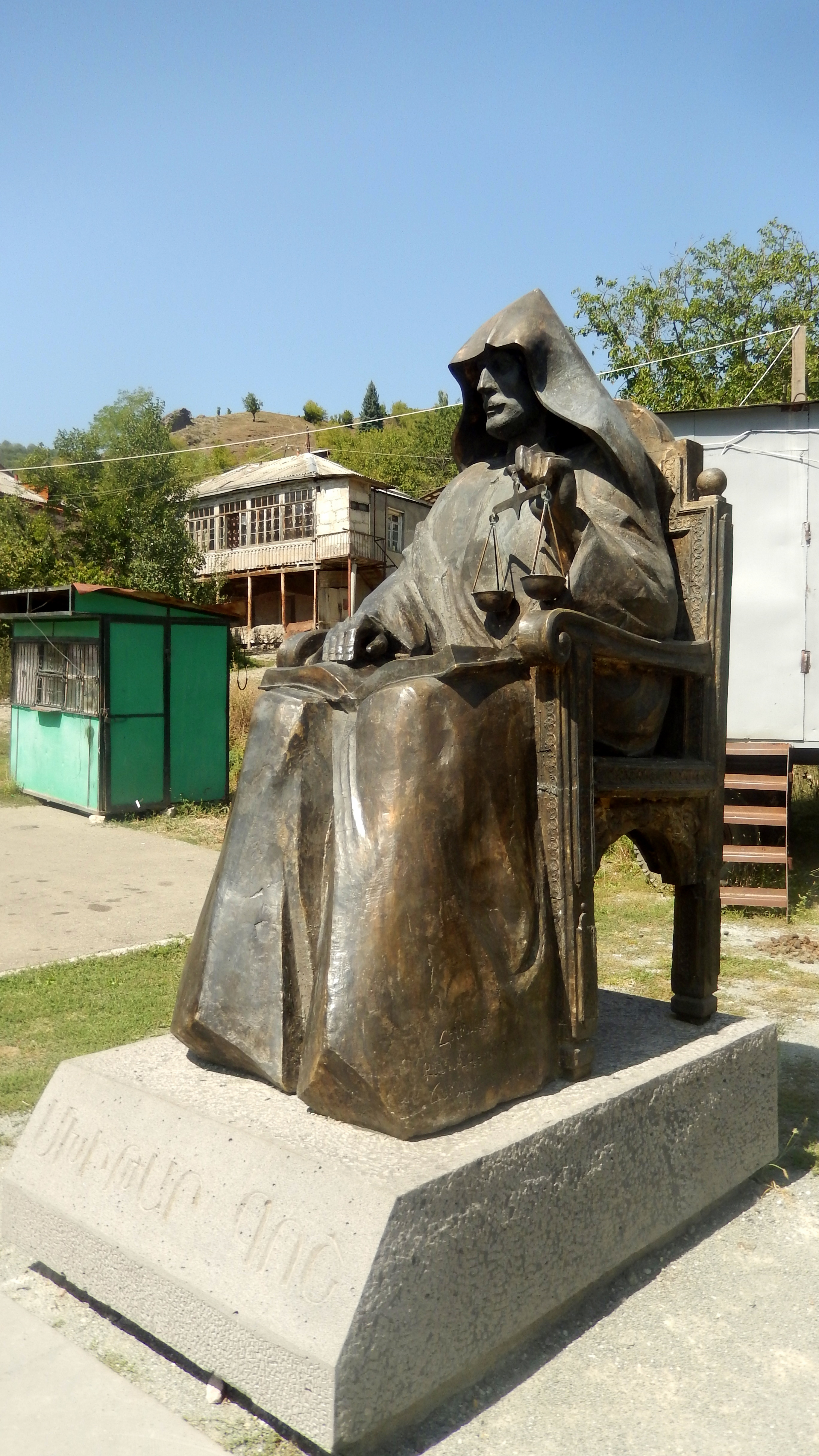 Մխիթար Գոշի հուշարձանը Գոշում